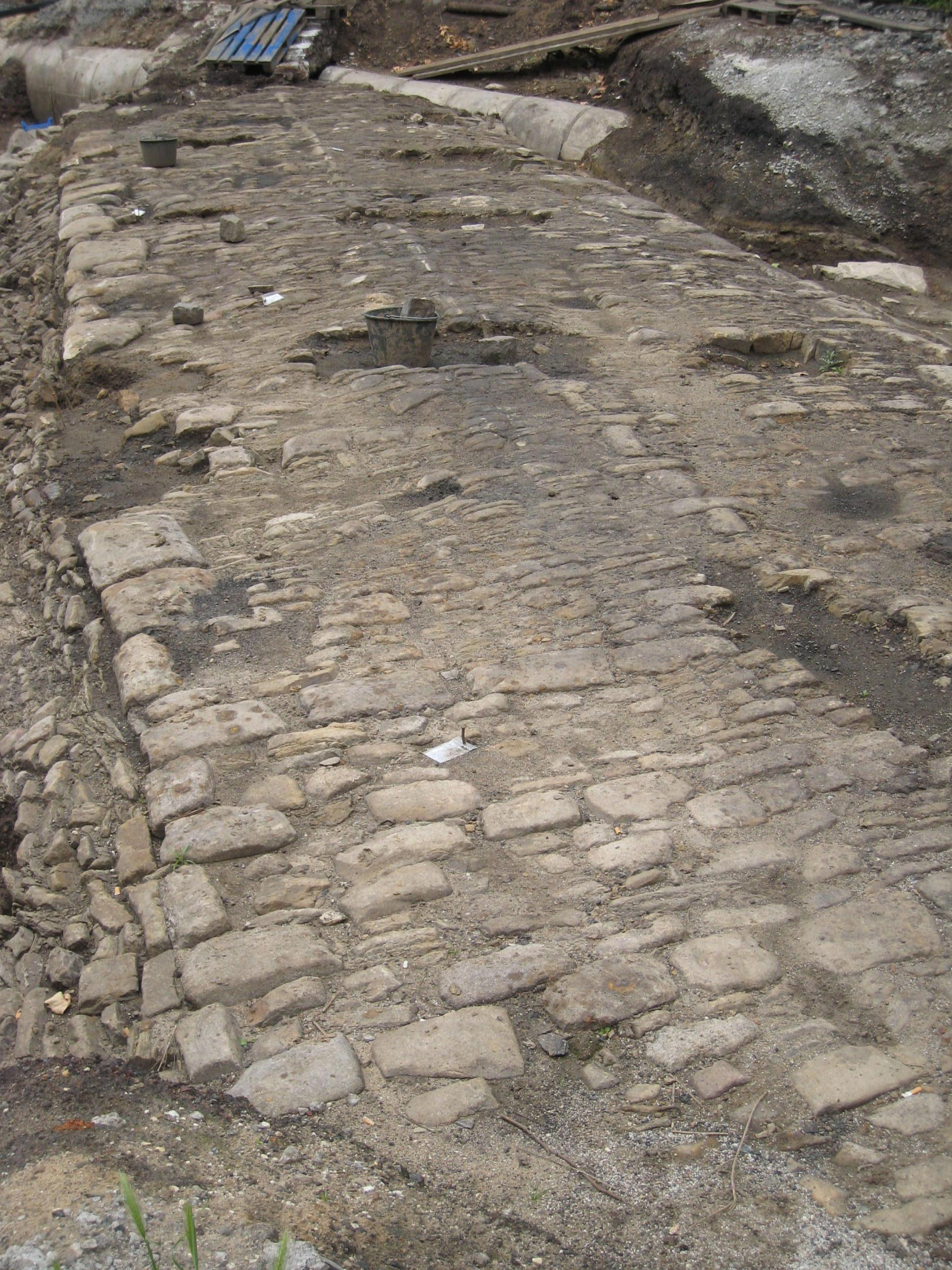 Archäologische Ausgrabungen vor der Hörder Burg